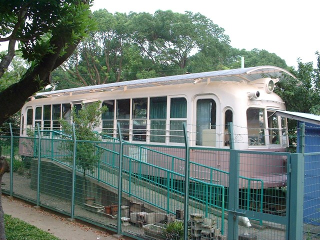 阪神国道線71形 71号 水明公園（尼崎市水明町）にて静態保存